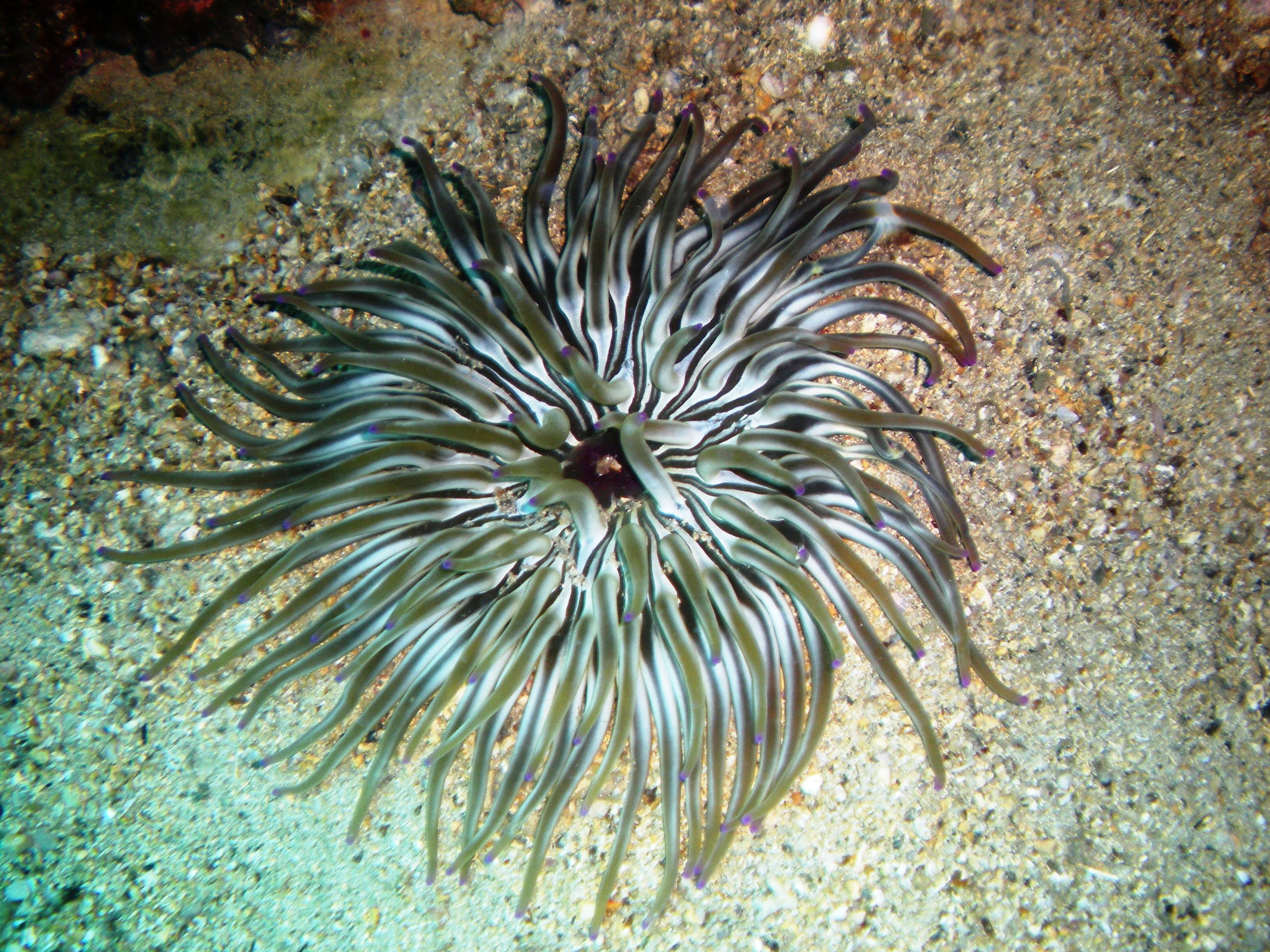 Condylactis aurantiacamar Adriatico, isola di Brac (Croatia)